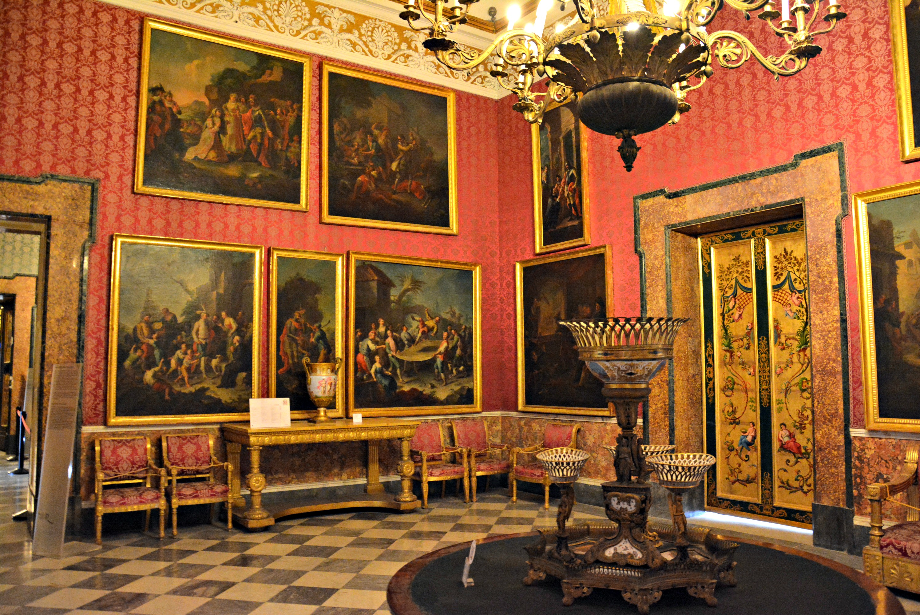 Vedi titolo